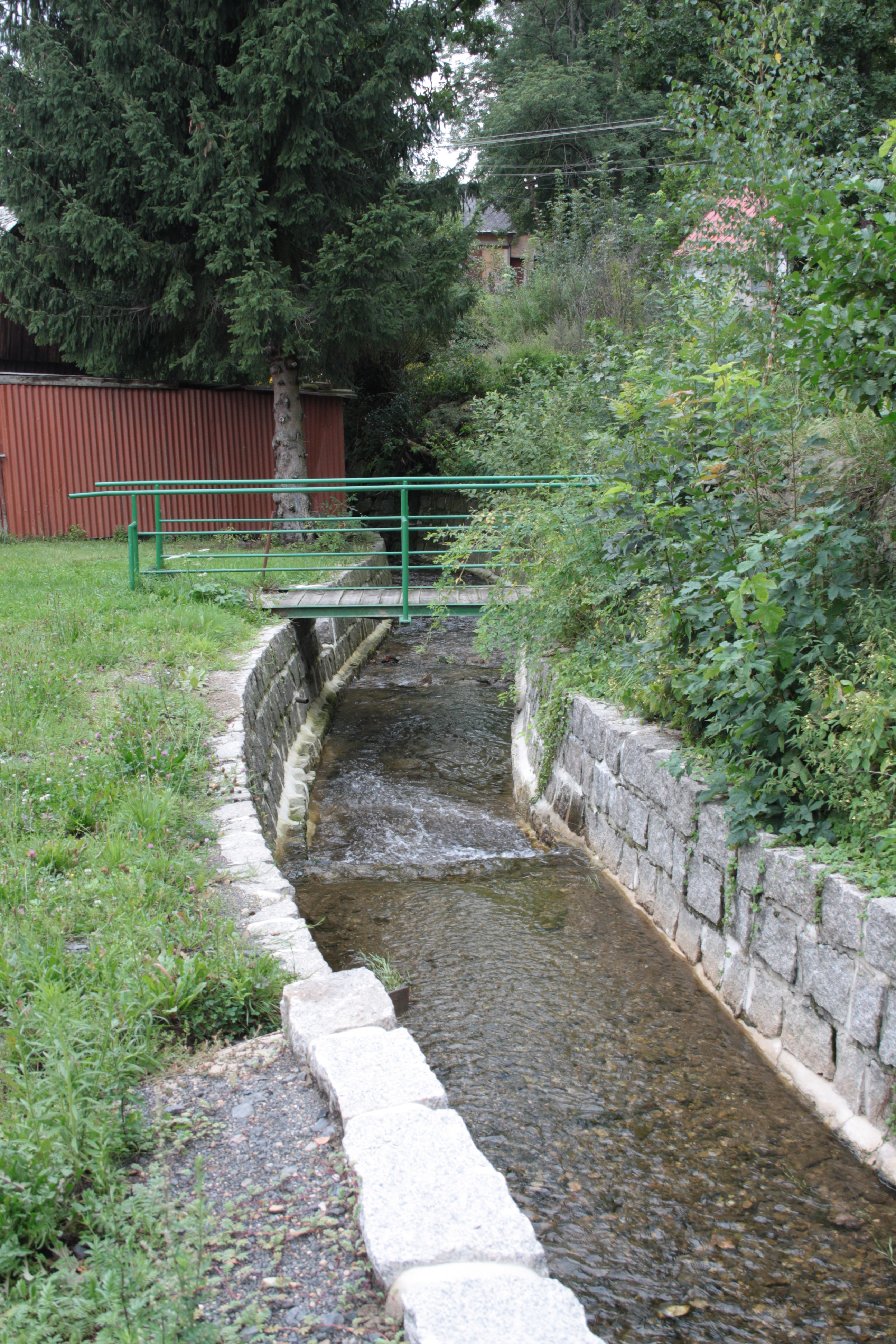 Libverdský potok poblíž domu čp. 49 v Lázních Libverdě.